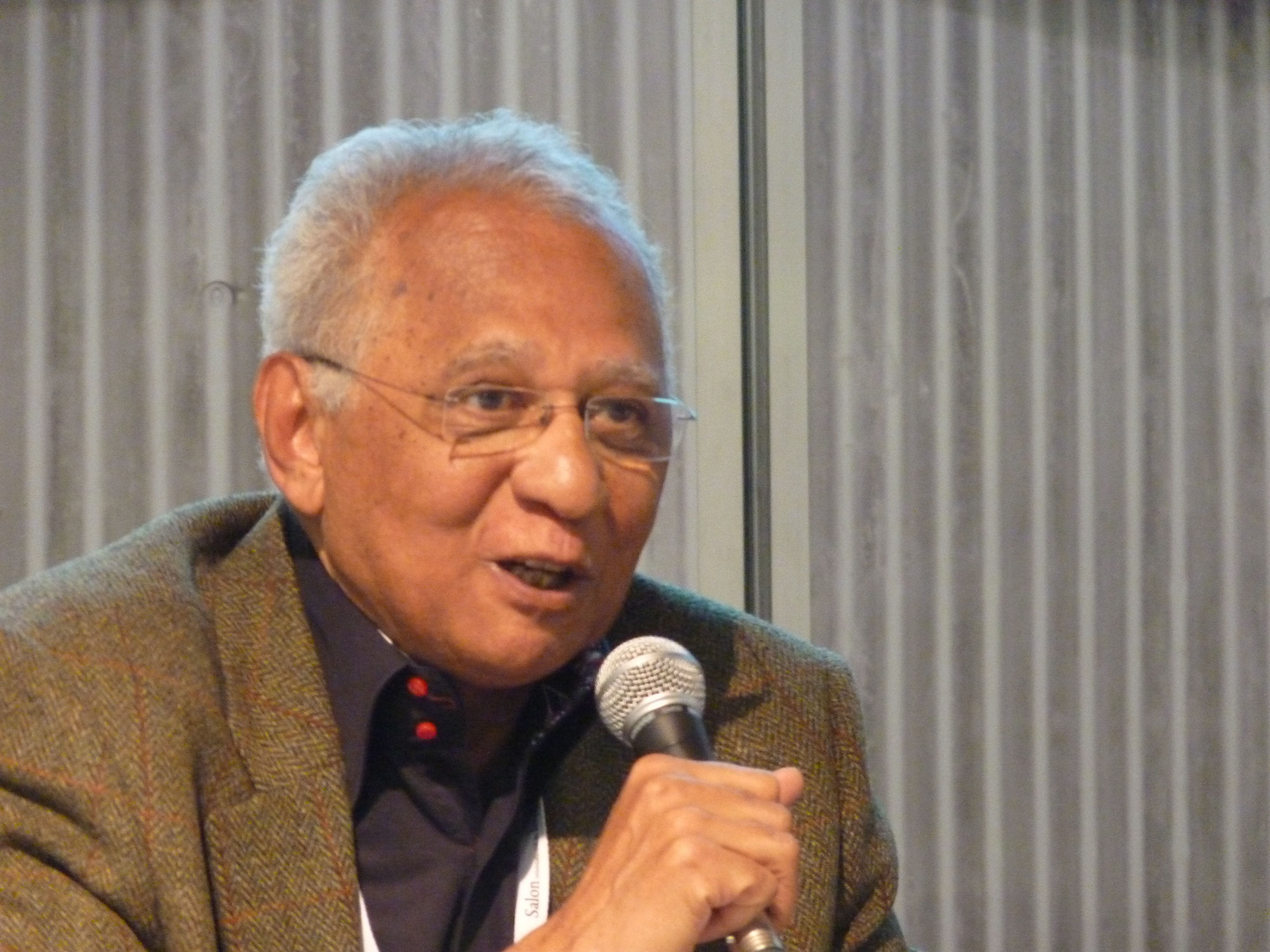 Henri Lopès au Salon du Livre de Genève en 2012